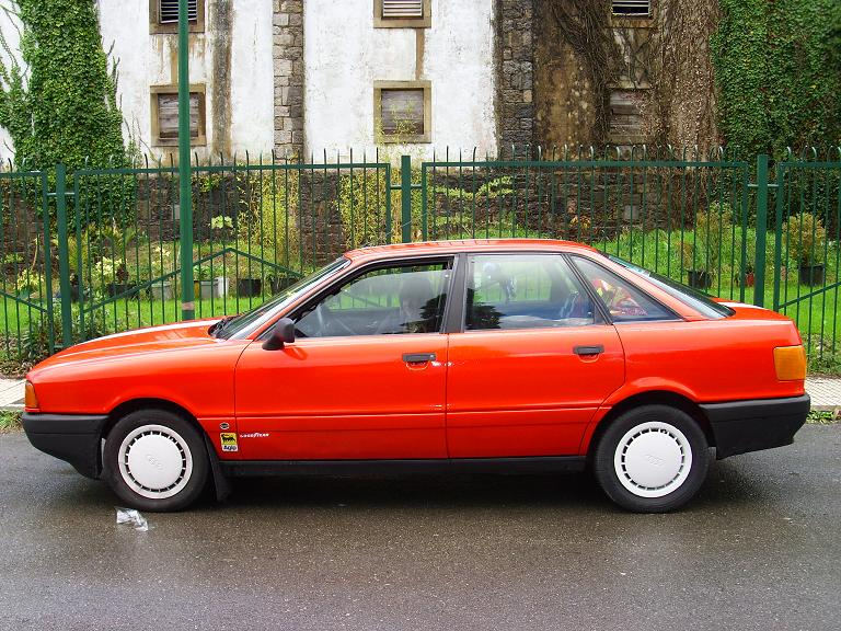 Lateral Audi 80